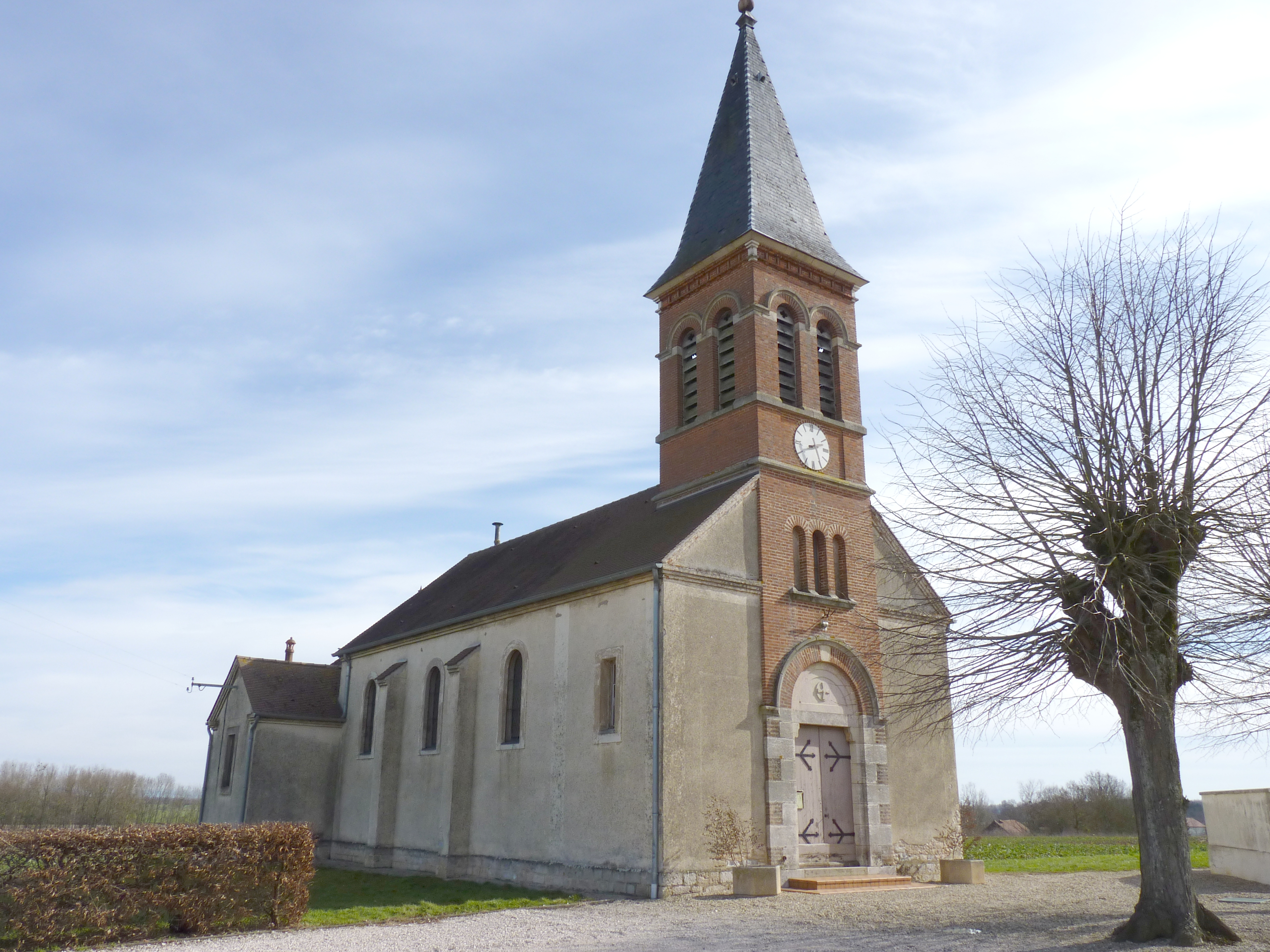 Église de Montagny-lès-Seurre (Côte d'Or, Bourgogne, France)